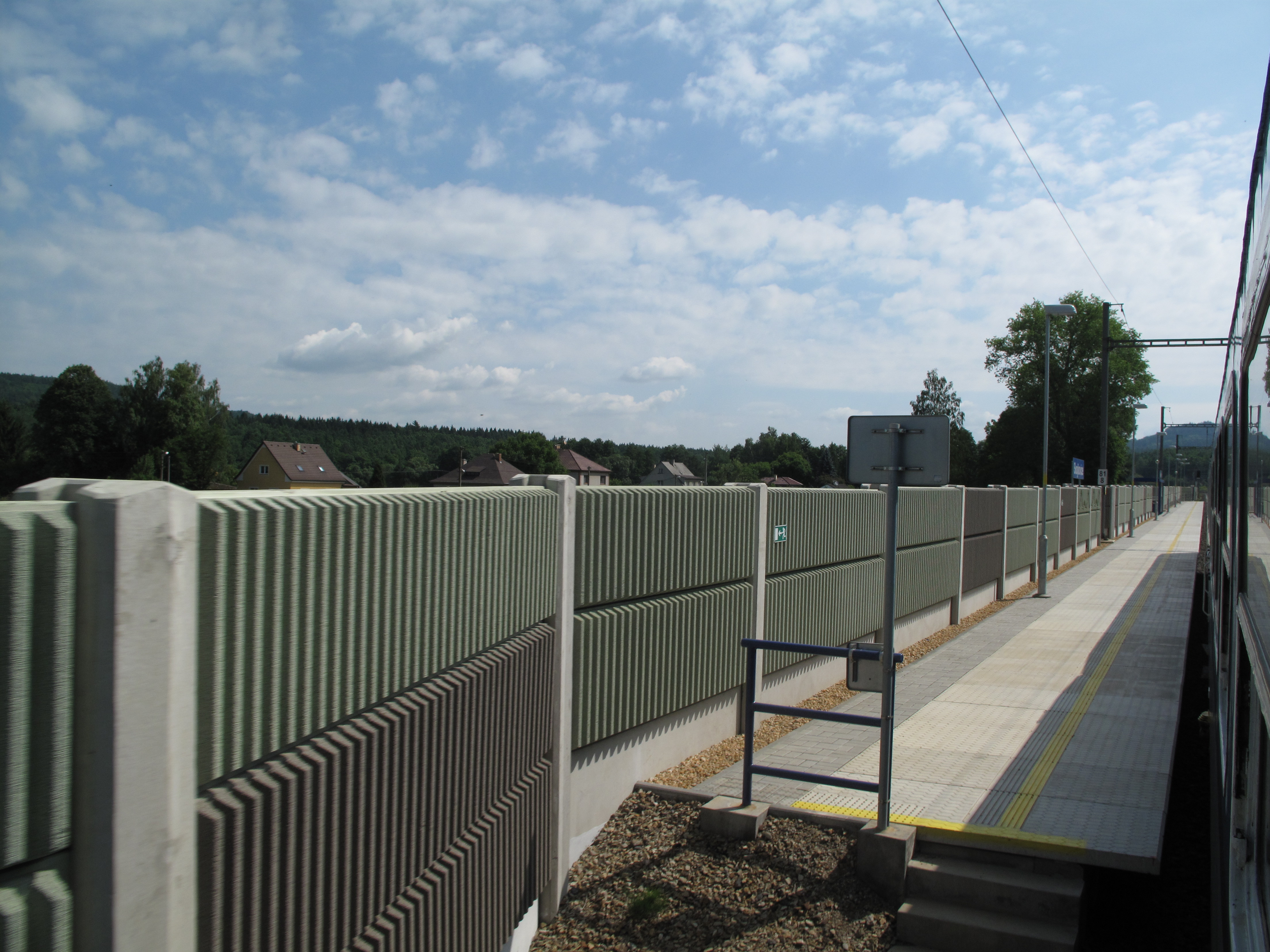 Svojkovice, železniční stanice